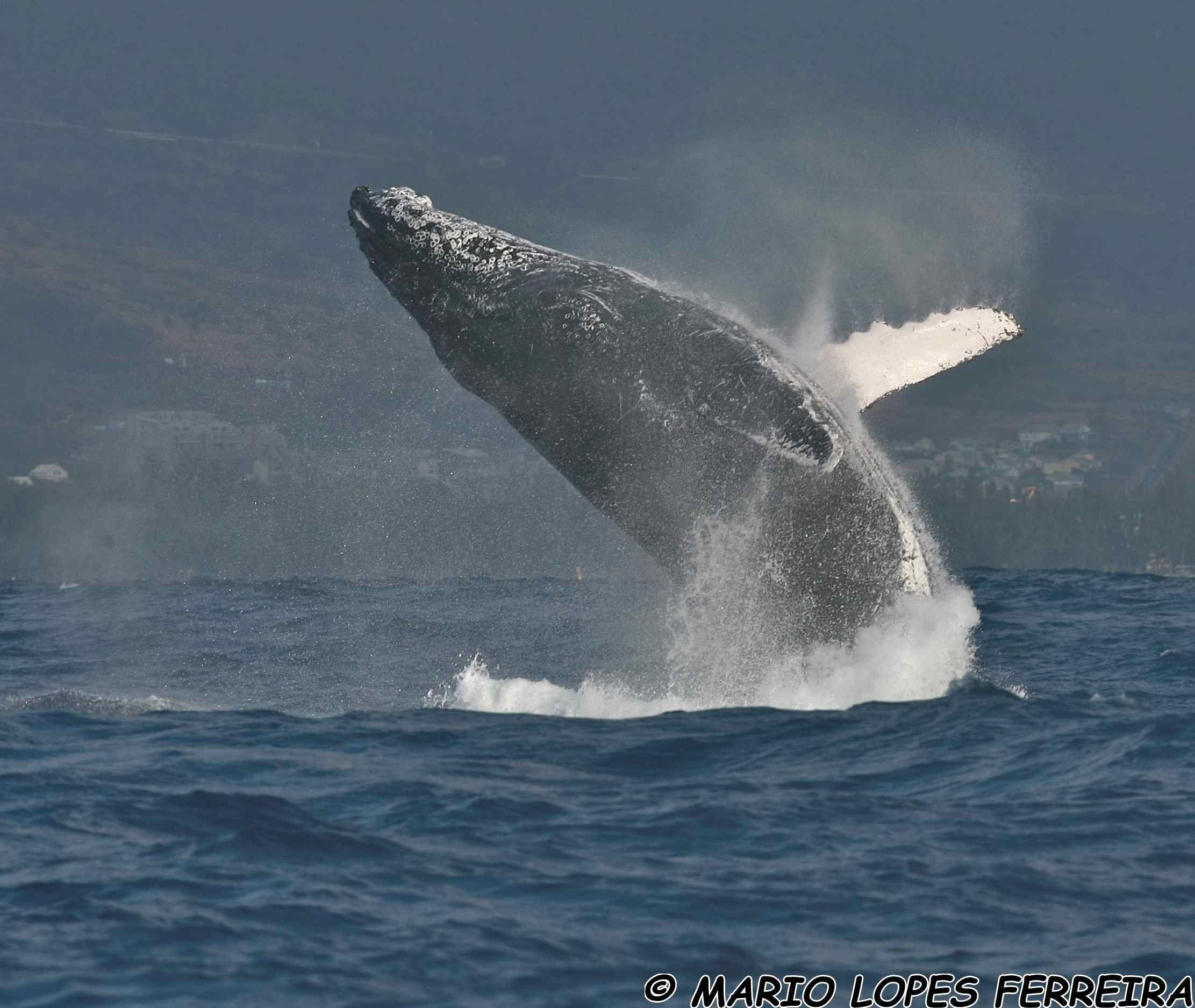 Magnifique saut de baleine à bosses dans la baie de St Gilles.